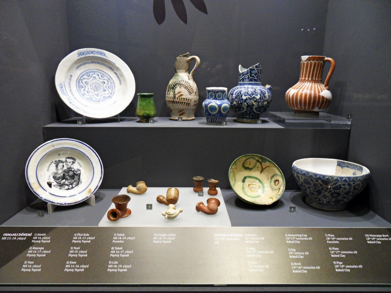 Yenikapı'da bulunan tabak vb. eşyalar.